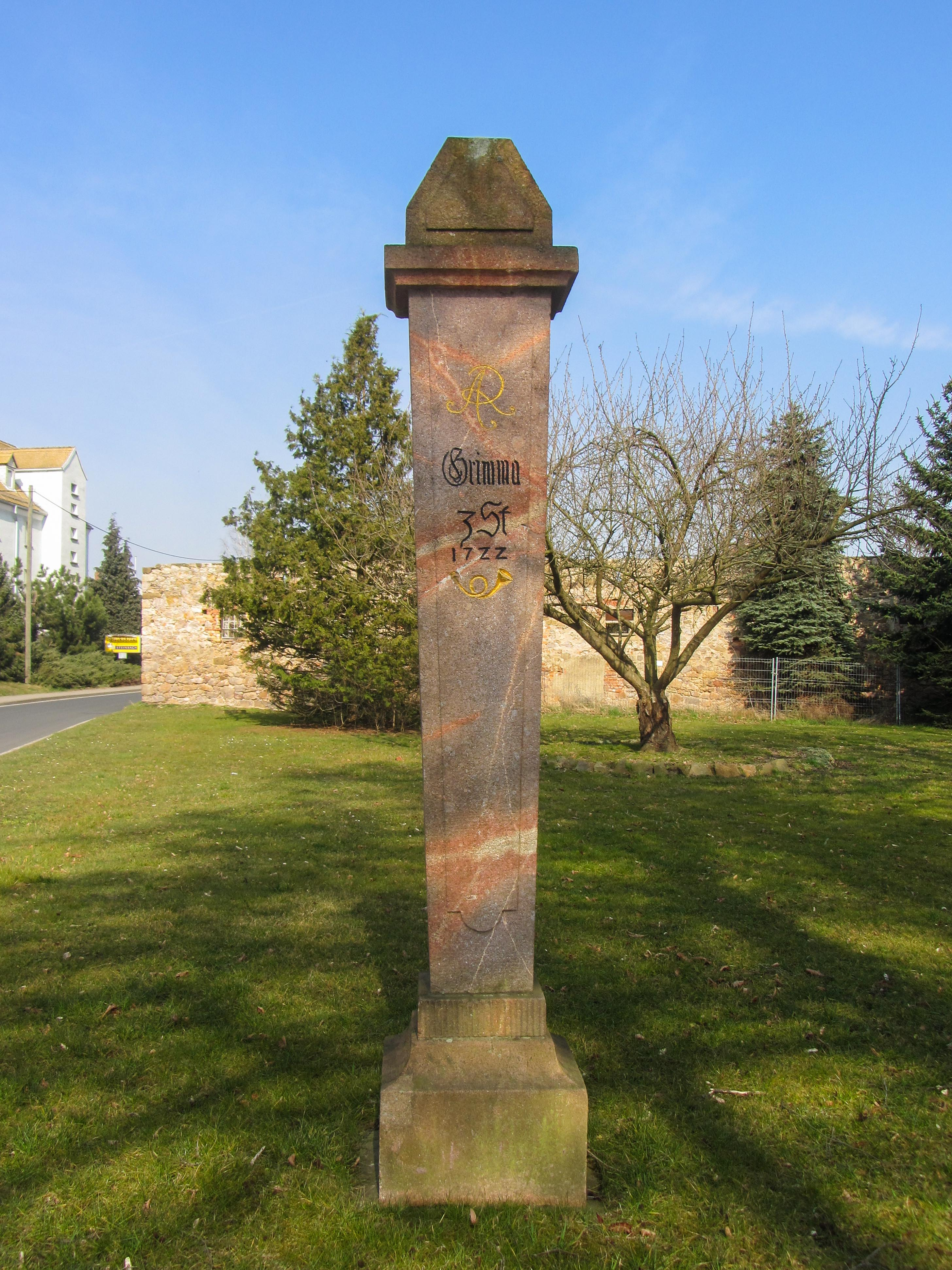 Kursächsische Postmeilensäule, Halbmeilensäule Nr. 6 in Bad Lausick OT Steinbach Text: Seite 1: AR / Borna 2 ST. / 1722 / Posthorn Seite 2: AR / Grimma 3 ST. / 1722 / Posthorn / Seite 3 No 6